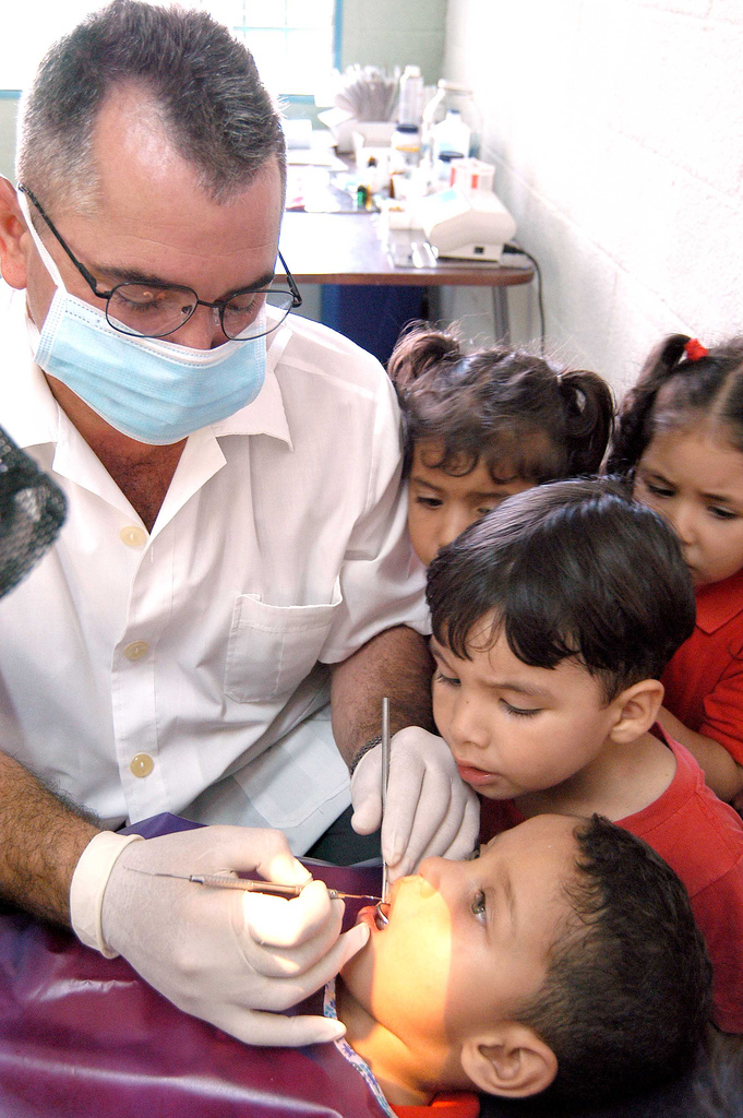 Misión Barrio Adentro. El Dr. Jóse Castañeda, odontólogo, es el encargado de velar por la salud de los niños de esta escuela. Los niños no pierden oportunidad para ver todo lo que el médico esta haciendo. Lugar: Centro Niños de Bolívar. Santa Catalina, parroquia Jacinto Plaza, estado Mérida, Venezuela. Fecha: 06 de Mayo de 2004